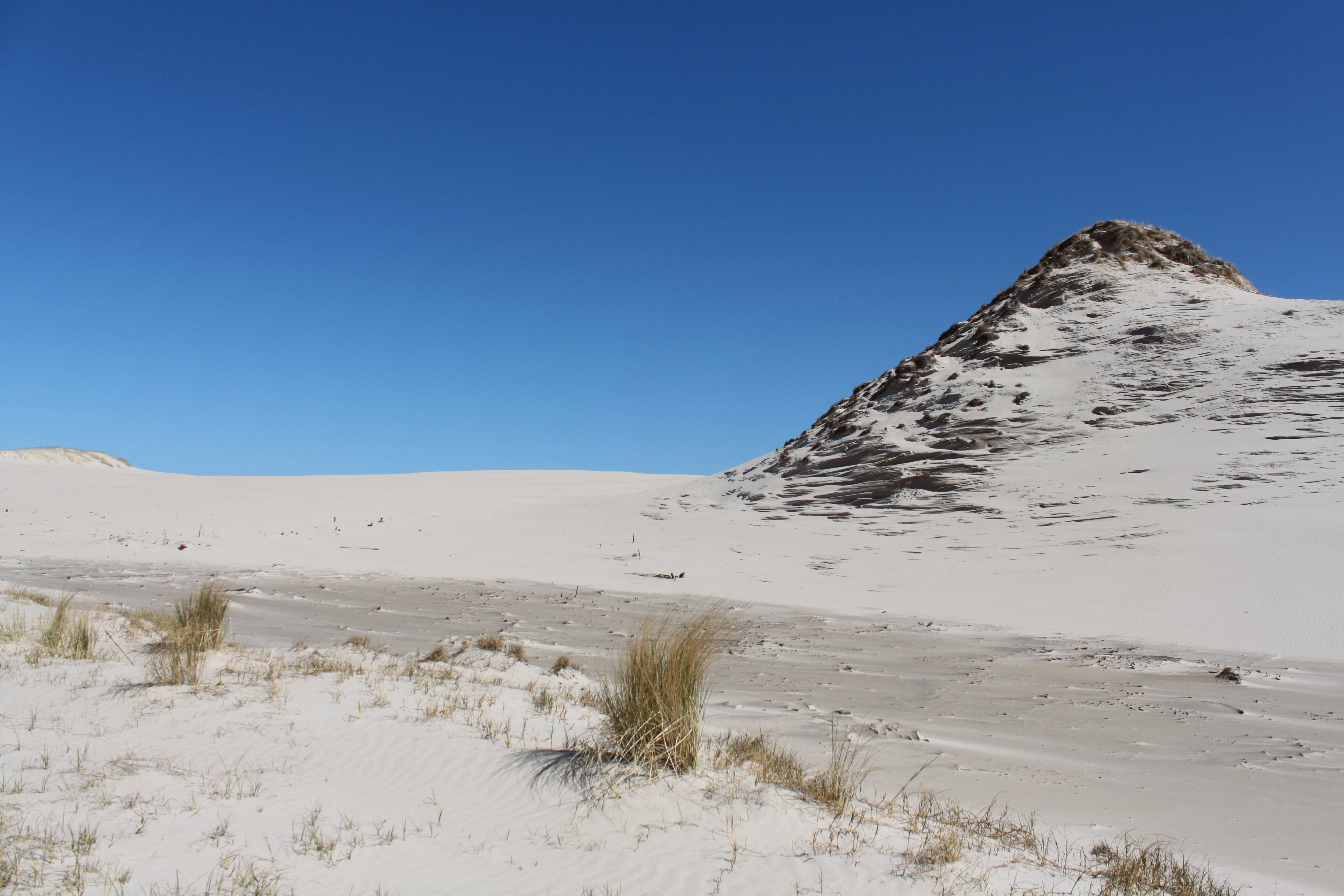 Specjalny obszar ochrony siedlisk Ostoja Słowińska. This is a photography of Natura 2000 protected area with ID PLH220023